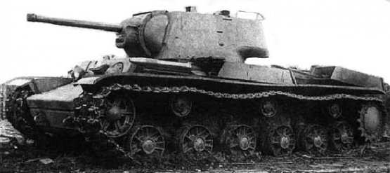 Гусеничный ракетный танк СССР